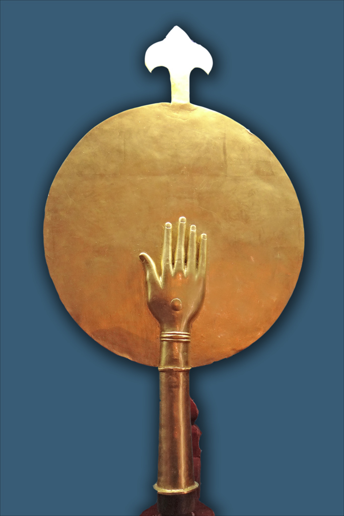 Mahi Maratib Ce type d'insigne honorifique en forme de main et en or a été offert à plusieurs Maharadjas de Bikaner (Anup Singh Ji a été le premier) par les Empereurs Moghols. Musée du fort Junagarh